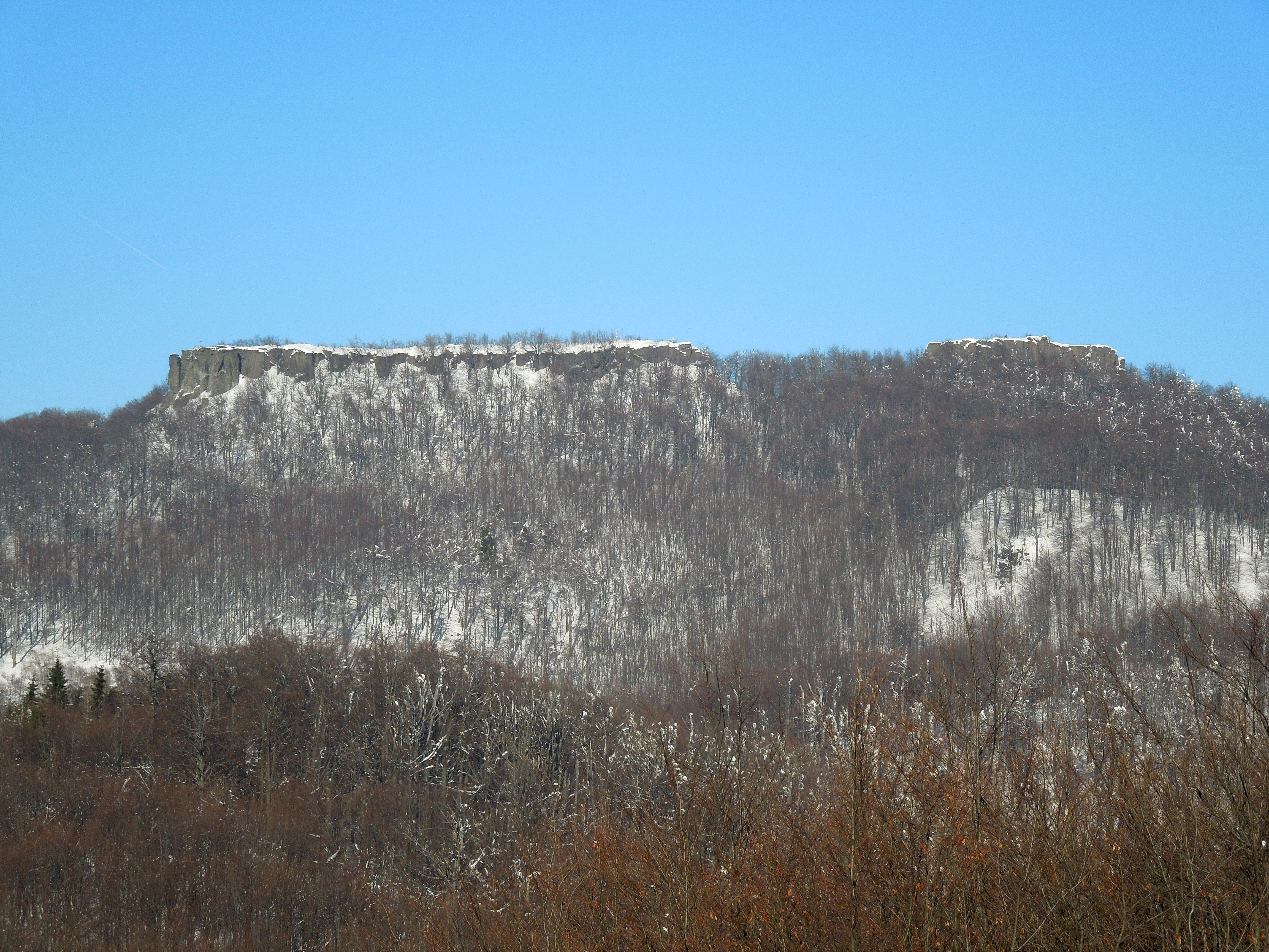 Vrcholové plošiny – dva skalné útvary tzv. Veľký a Malý Sninský kameň This is a photography of Natura 2000 protected area with ID SKUEV0209